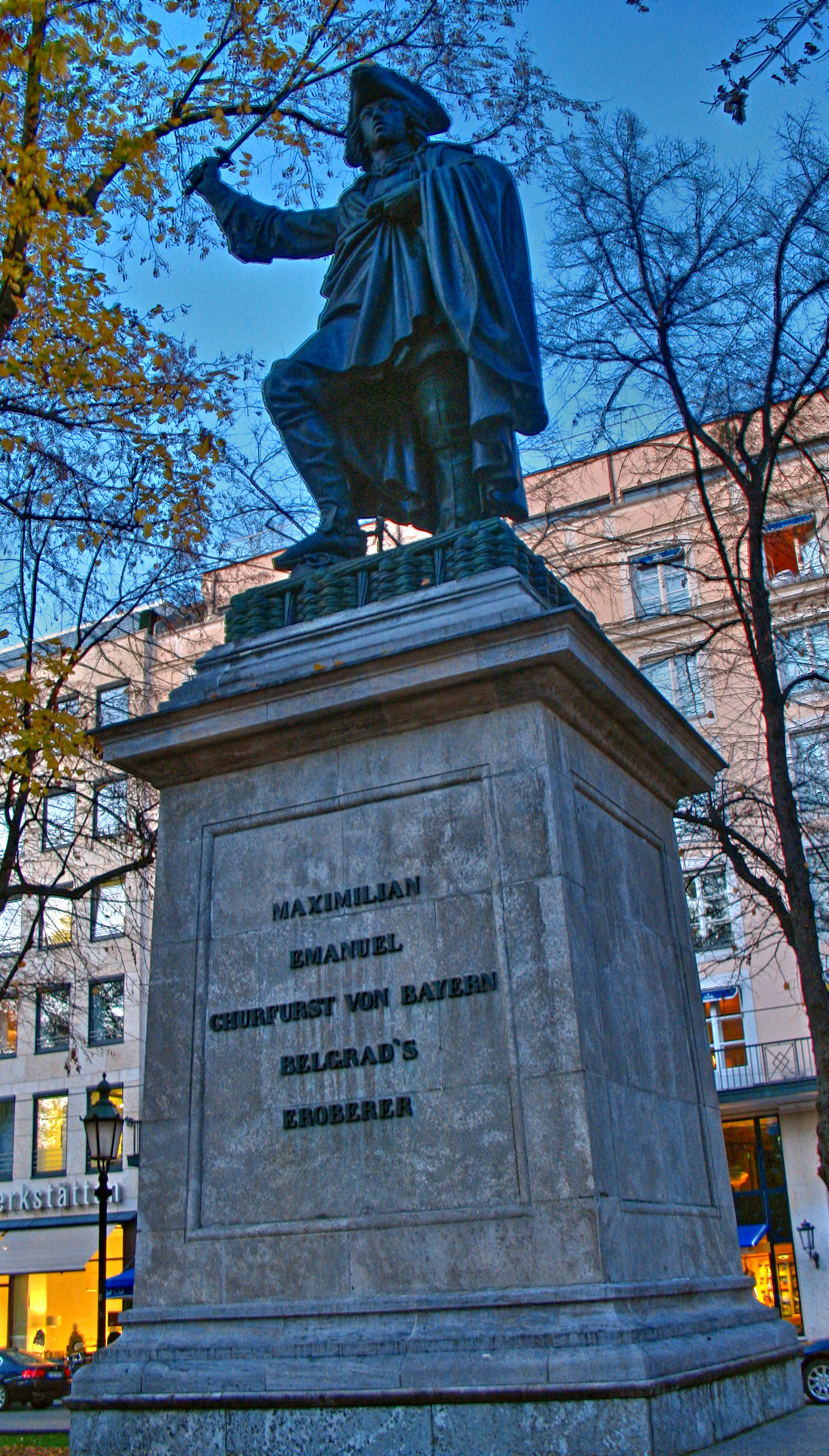 Germany, Bavaria, Munich, Max-Emanuel-Denkmal by Friedrich Brugger von 1861